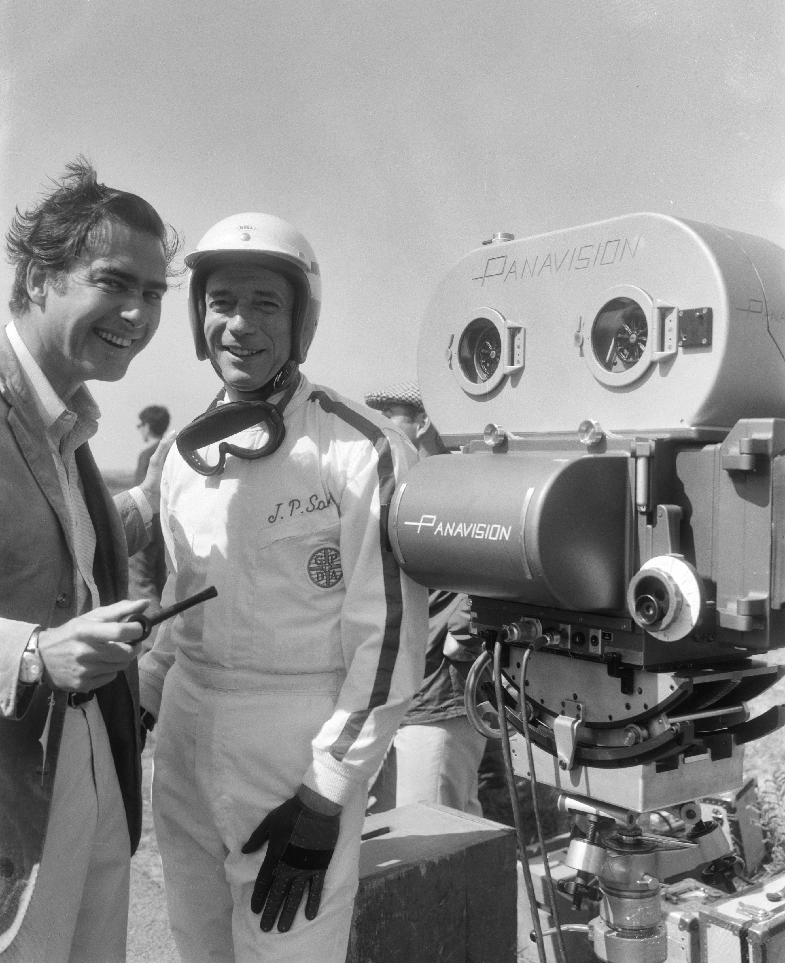 Cineramafilm "Grand Prix" , filmopnames te Zandvoort, rechts Yves Montand [als coureur Jean Paul Sarti] en regisseur John Frankenheimer